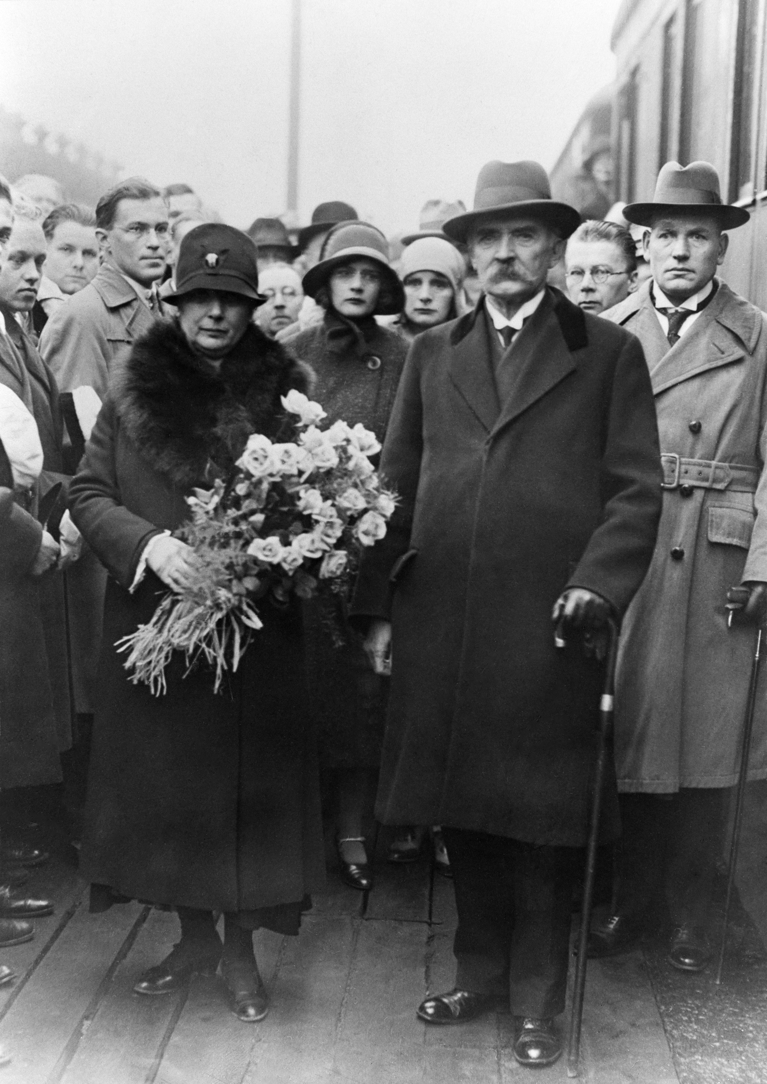 Entinen presidentti K. J. Ståhlberg ja Ester Ståhlberg Helsingin rautatieasemalla palaamassa Joensuusta kyydityksen jälkeen. Heidän takanaan keskellä tytär Elli Ståhlberg.